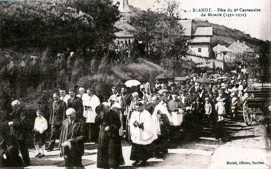 Procession démarrant de l'église Saint-Andoche-et-Saint-Thyrse de Blanot, en la Fête-Dieu (1931).